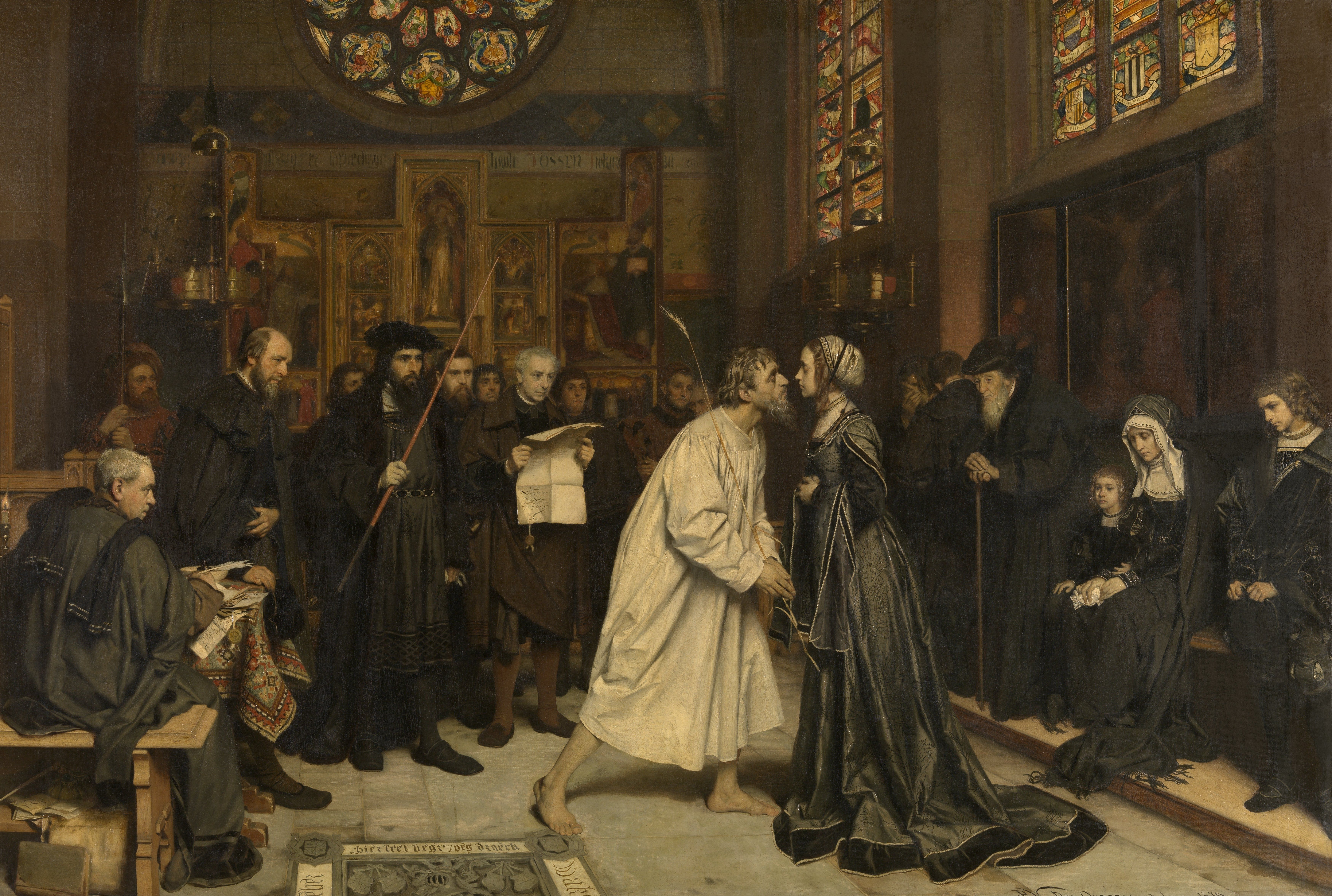 Die Mundsühne